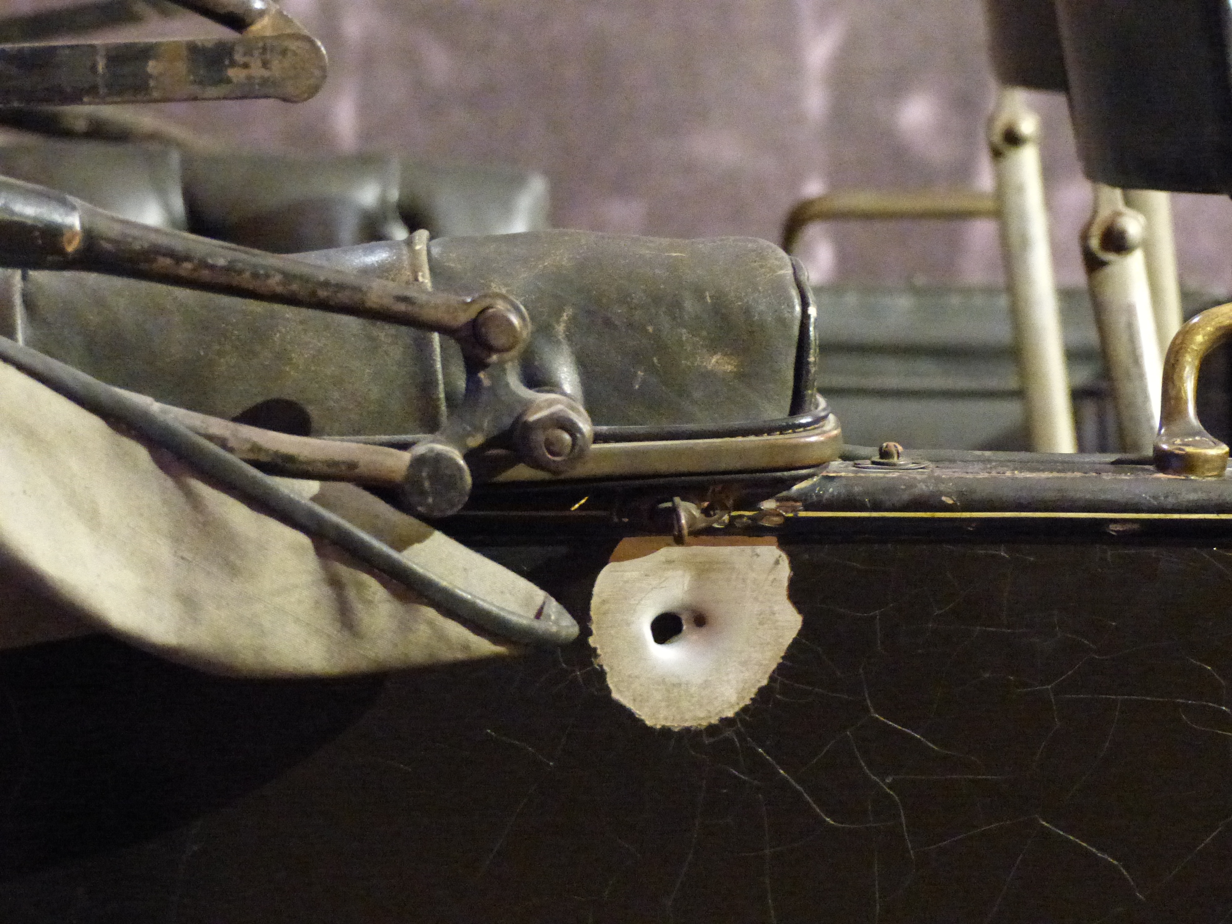 Gräf & Stift Automobil (mit Einschussloch) im Heeresgeschichtlichen Museum in Wien, mit dem Thronfolger Franz Ferdiand in Sarajevo unterwegs war